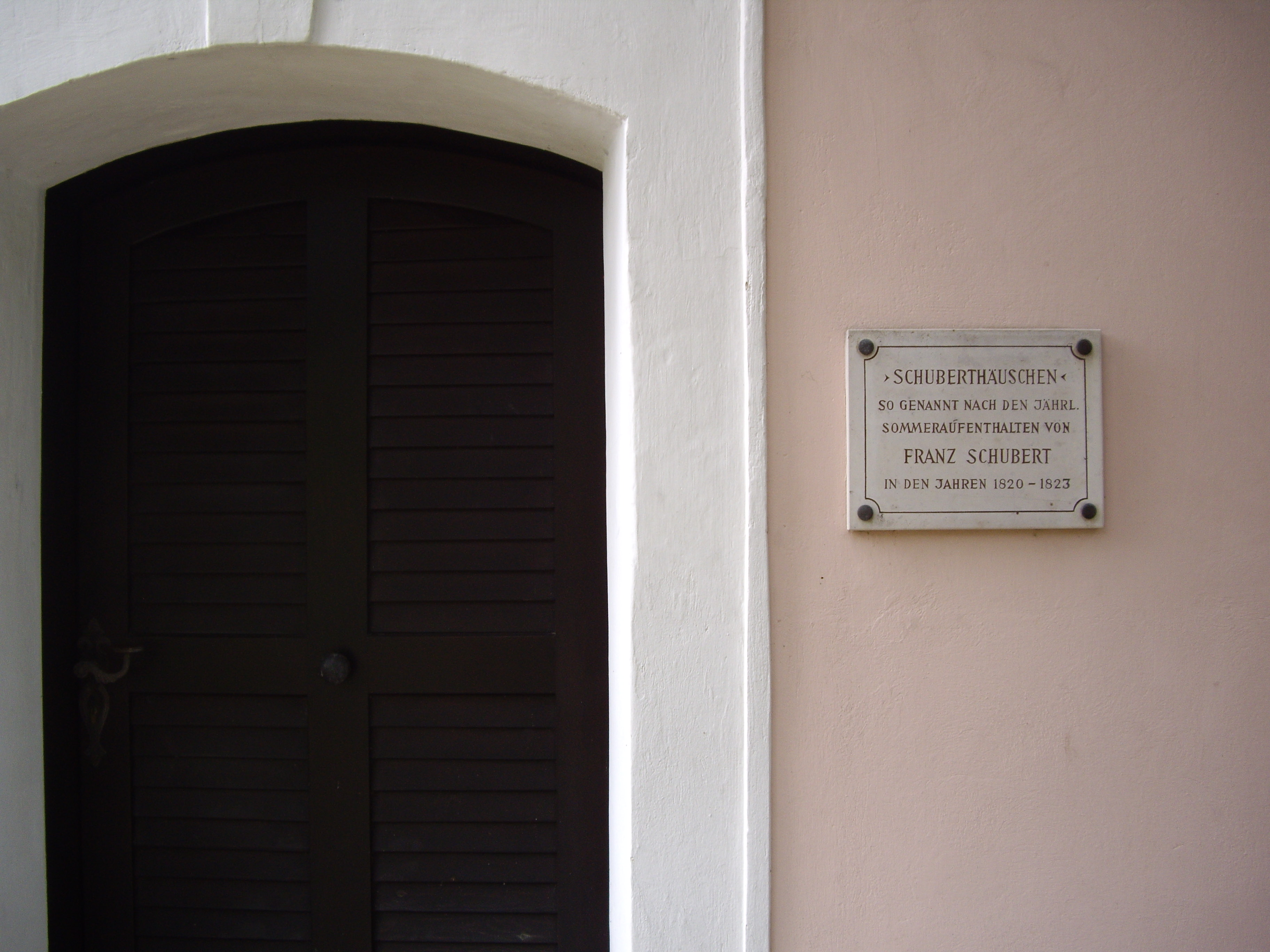 La Schubert-dometo, kie Franz Schubert loĝis en somero